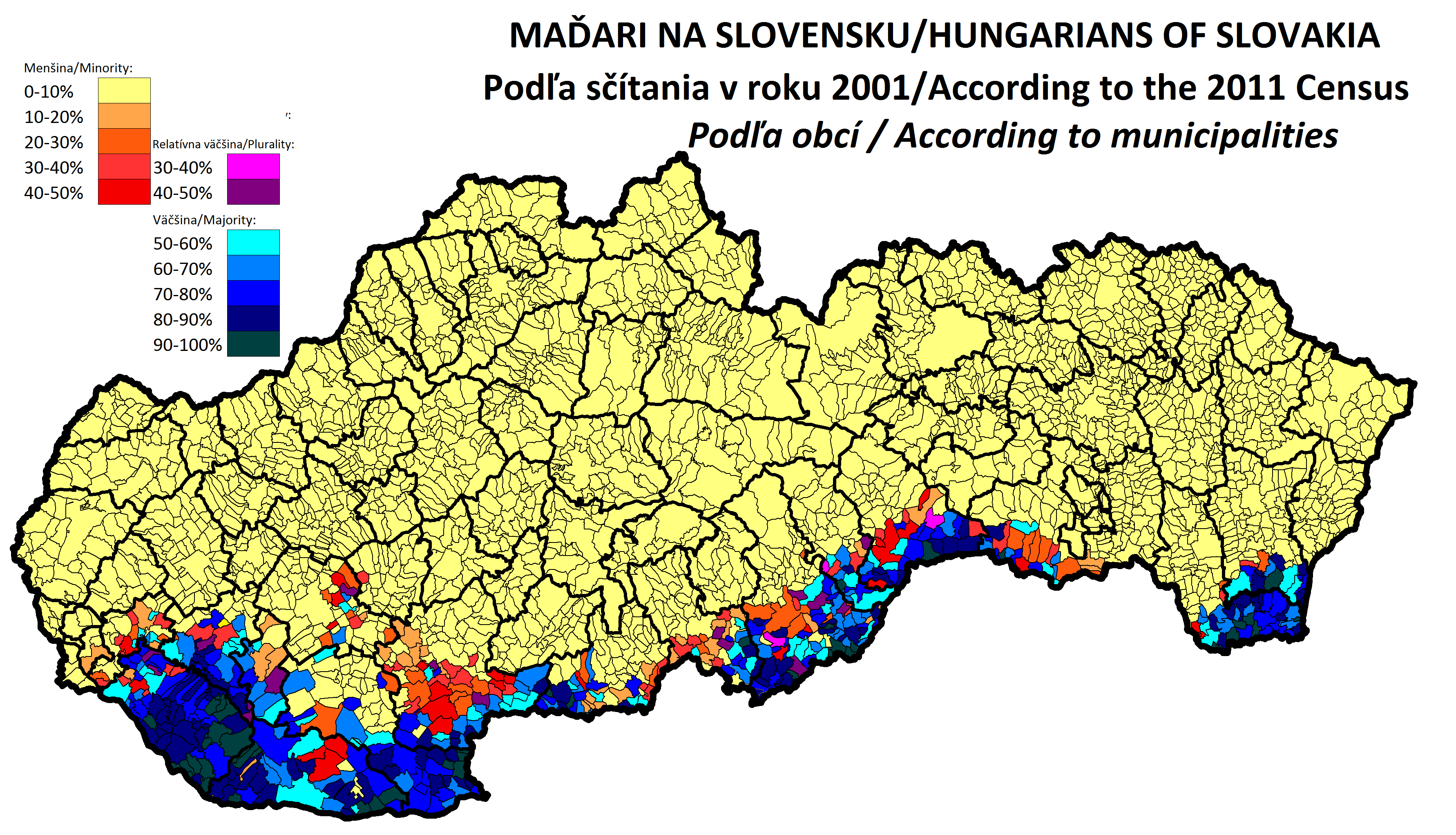 Percentuálne zastúpenie obyvateľov maďarskej národnosti, podľa sčítania v roku 2011.